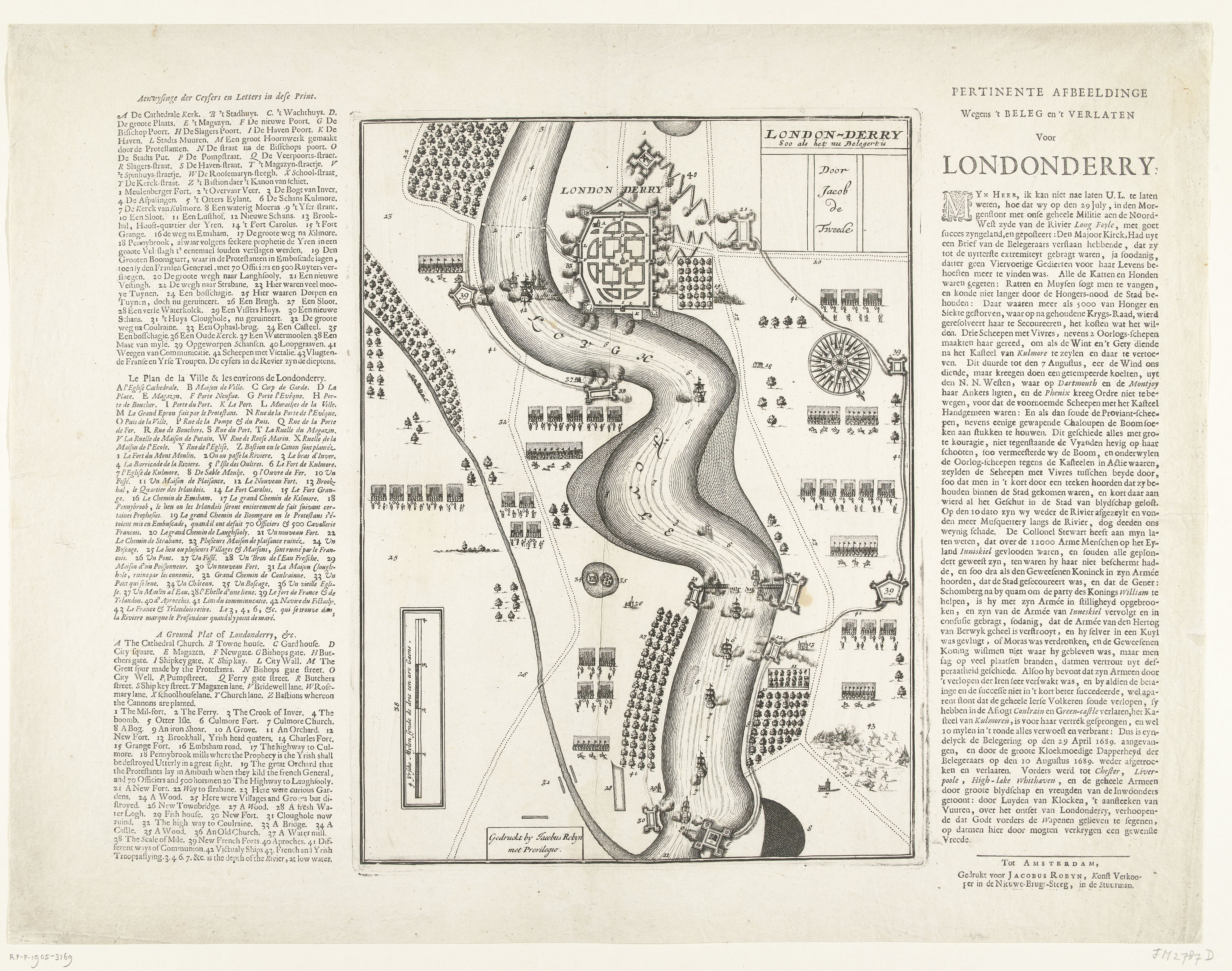 IdentificatieTitel(s): Kaart van het beleg van Londonderry, 1689Pertinente Afbeeldinge Wegens 't Beleg en 't Verlaten Voor Londonderry (titel op object)London-Derry Soo als het nu Belegert is Door Jacob de Tweede (titel op object)Objecttype: prent kaart nieuwsprent Objectnummer: RP-P-1905-3169Catalogusreferentie: FMH 2787-DOpmerking: 2(2); (toegevoegd nummer RPK)Omschrijving: Kaart van het onsuccesvolle beleg van Londonderry door het leger van Jacobus II, 28 april-10 augustus 1689. Aan de linkerzijde de legenda's A-Z en 1-43 in drie kolommen in het Nederlands, Frans en Engels. Rechts een beschrijving van de gebeurtenissen tussen 29 april en 10 augustus 1689.VervaardigingVervaardiger: prentmaker: anoniemuitgever: Jacobus Robijn (vermeld op object)verlener van privilege: onbekendPlaats vervaardiging: prentmaker: Noordelijke Nederlandenuitgever: AmsterdamDatering: 1689Fysieke kenmerken: ets met tekst in boekdrukMateriaal: papier Techniek: etsen / boekdrukAfmetingen: blad: h 430 mm × b 561 mmToelichtingNiet in Frederik Muller; door het RPK toegevoegd nummer. Latere staat van de kaart gebruikt in FMH 2787B.OnderwerpWat: beleg, stellingoorlogmaps of citiesBeleg van LondonderryWanneer: 1689 - 1689Waar: LondonderryWie: Jacobus II (koning van Engeland en Schotland)Verwerving en rechtenCredit line: Schenking van de heer A. van der Poest ClementVerwerving: schenking 1905Copyright: Publiek domein